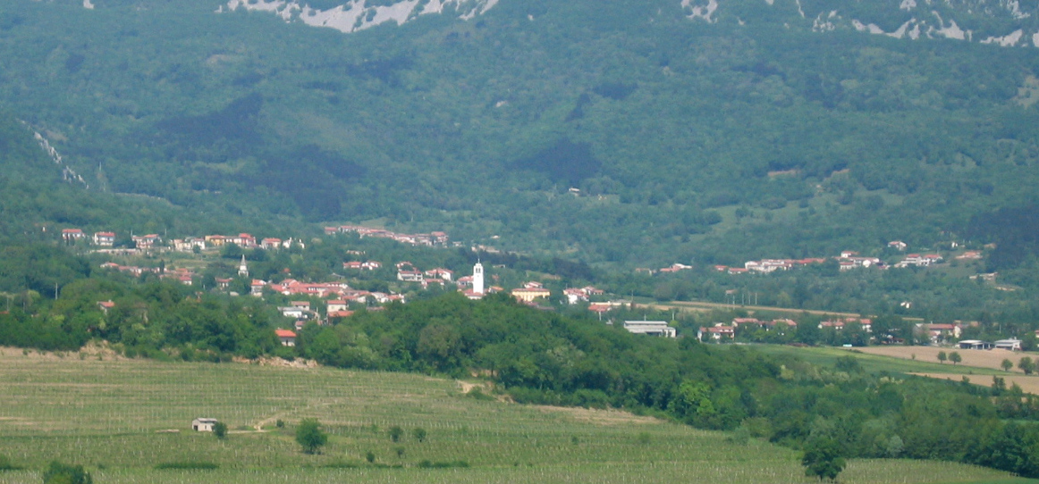 Lokavec, village near Ajdovščina, Slovenia